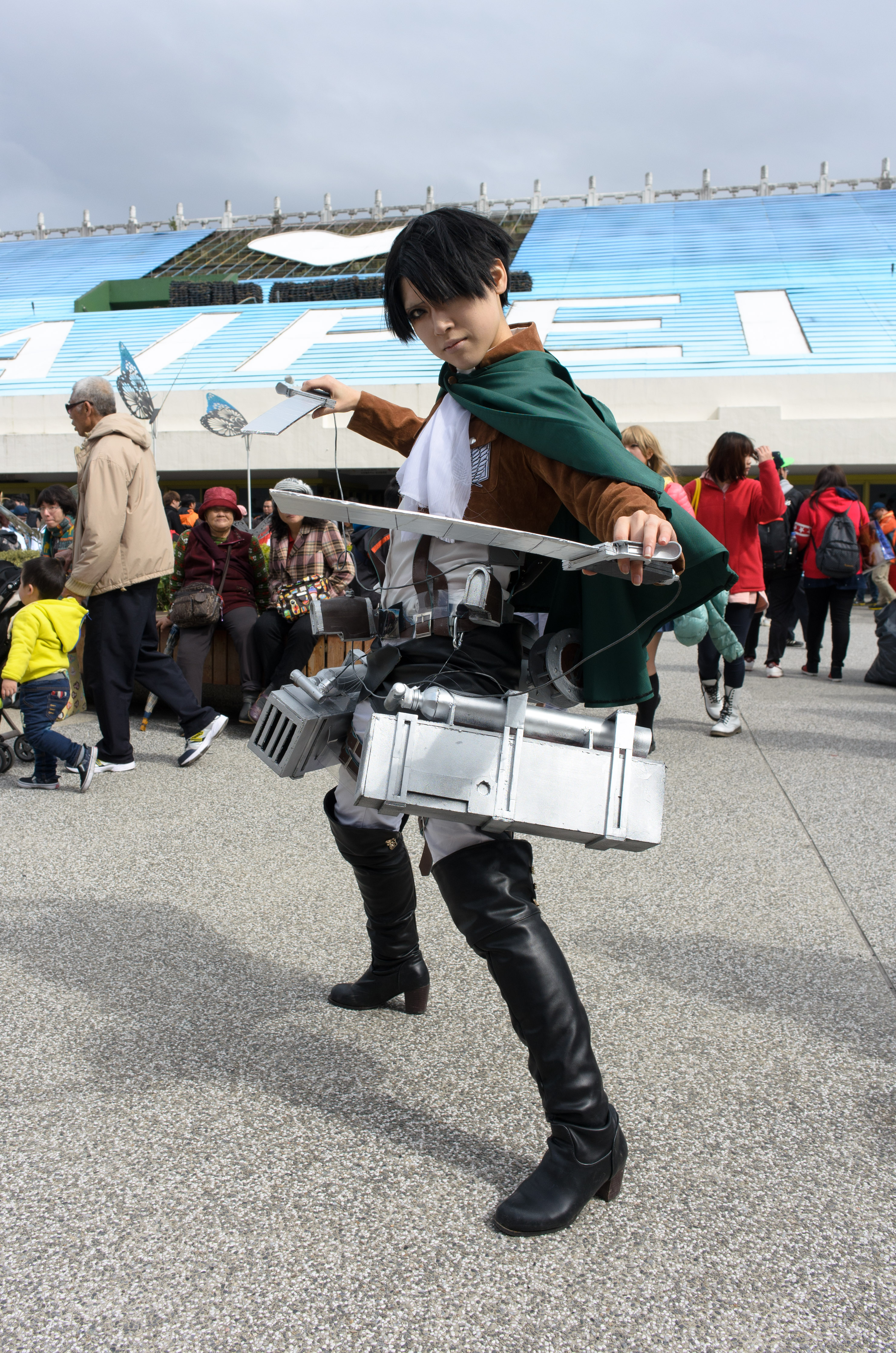 FF25第二日下午，＜進擊的巨人＞里維兵長Cosplayer。